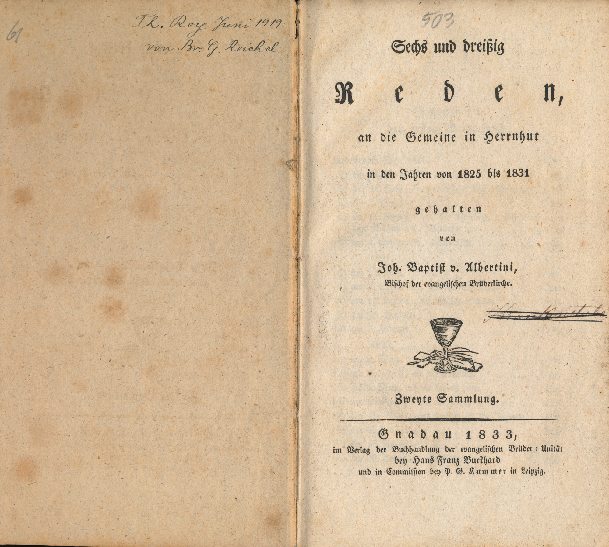 Sechs und dreißig Reden an die Gemeinde in Herrnhut in den Jahren von 1825 bis 1831 gehalten von Joh. Baptist v. Albertini, Bischof der evangelischen Brüderkirche. Zweyte Sammlung. Gnadau 1833. Aus der Sammlung Peter Schmelzle, Bad Wimpfen